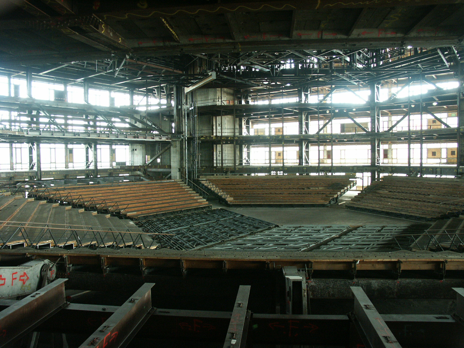 Im Inneren des "Palastes der Republik" während des Rückbaus (Oktober 2004)